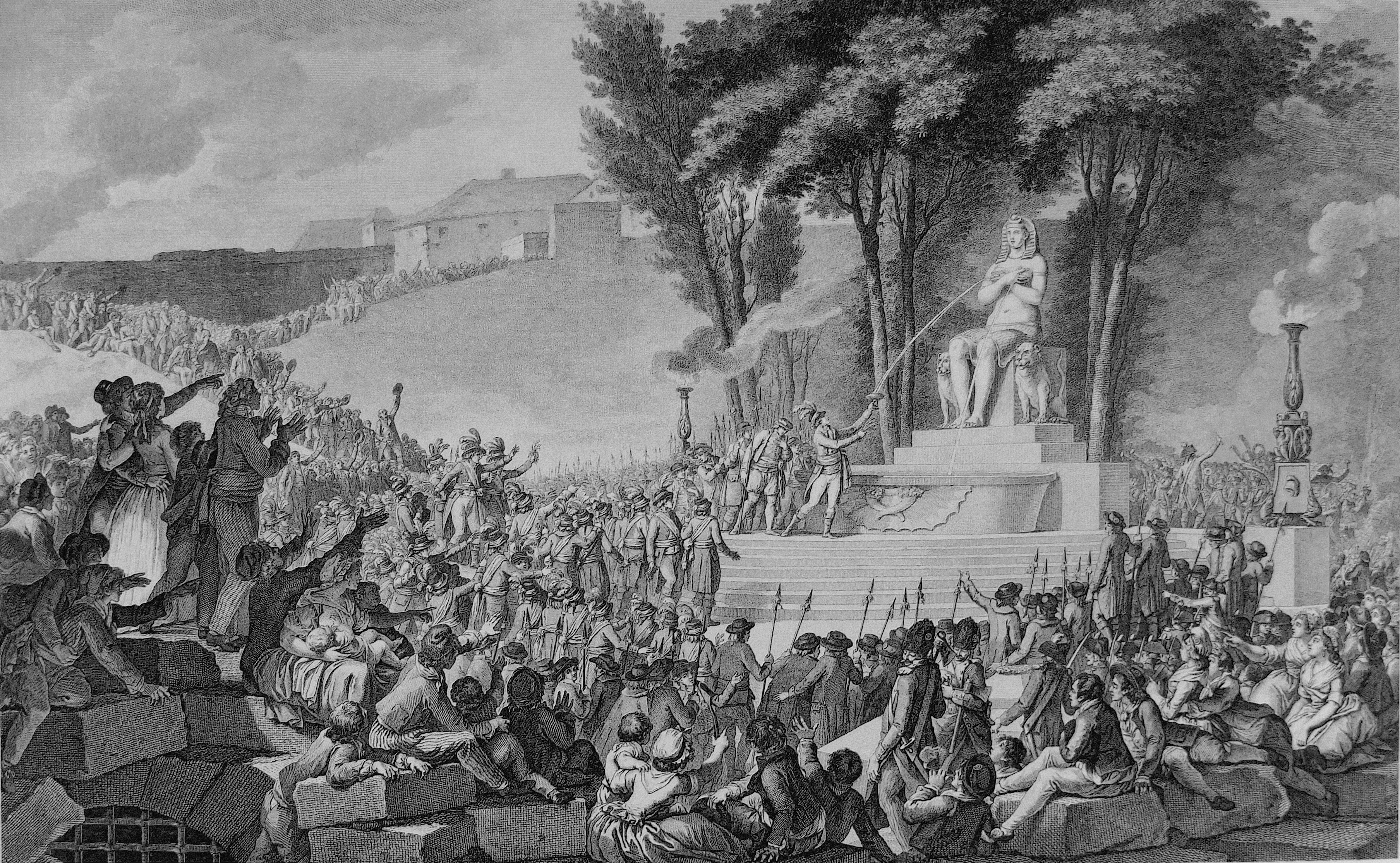 La Fontaine de la Régénération sur les débris de la Bastille, le 10 août 1793, dessin de Charles Monnet, gravure d'Isidore Stanislas Helman (1728-1799). Eau-forte et burin 38,2 x 52,4 cm. Paris, musée de l'Armée, cabinet des estampes, 07802, don de Georges Küss, 1949.